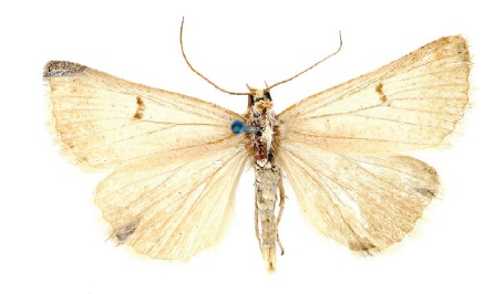 Lygephila pallida